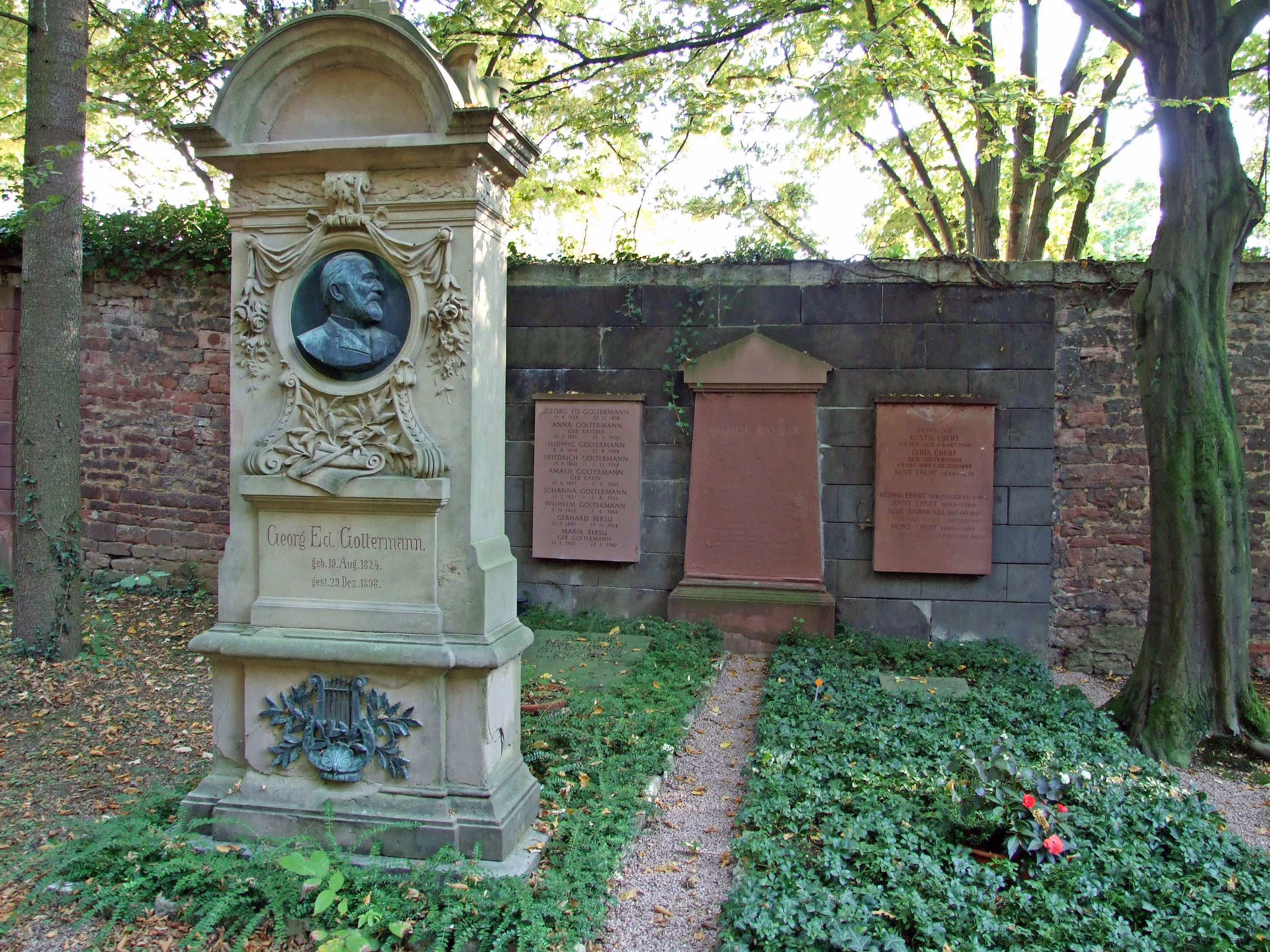 Grabmal von Georg Eduard Goltermann (Cellist und Komponist) auf dem Hauptfriefhof in Ffm.